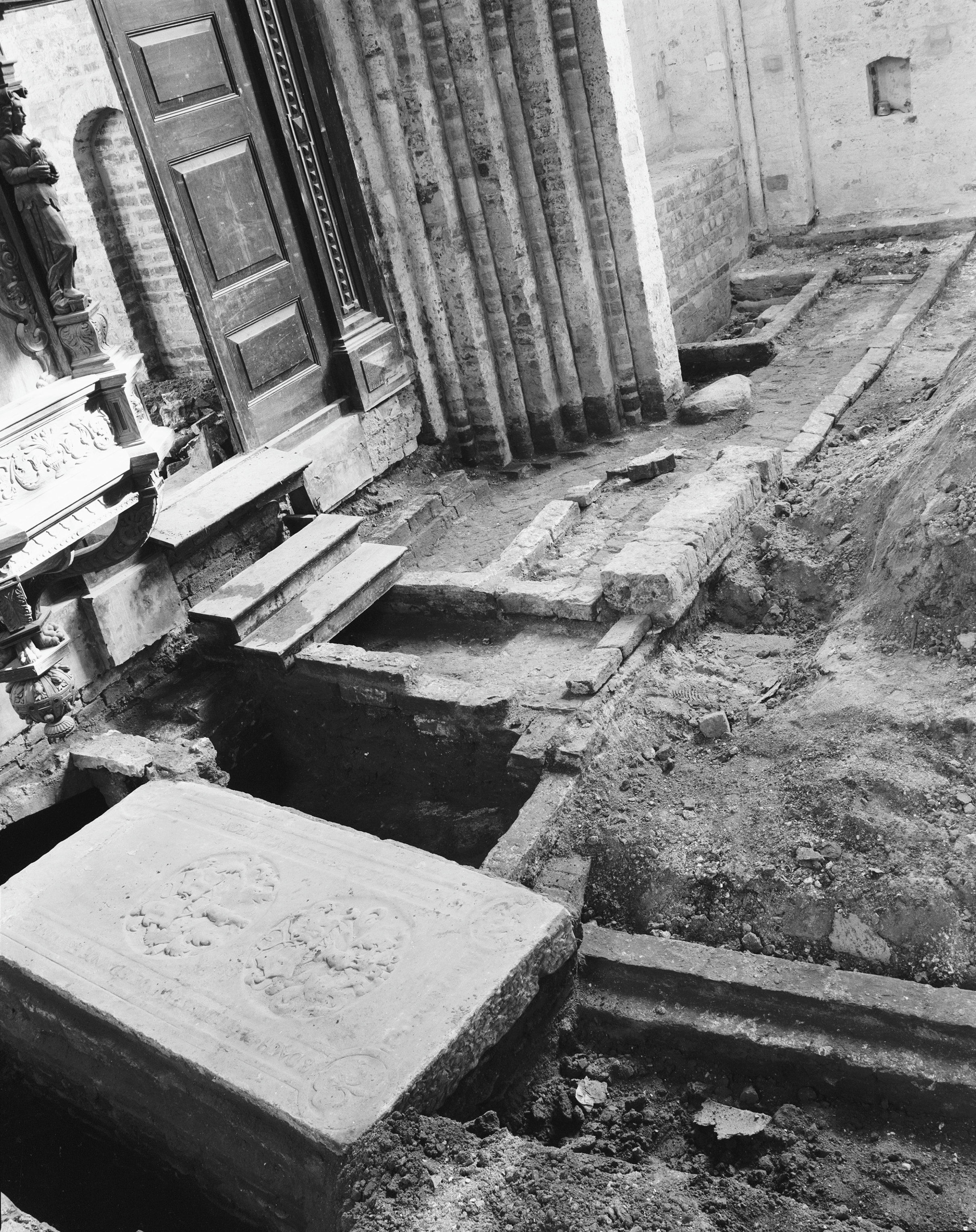 Hervormde Kerk: opgraving in viering